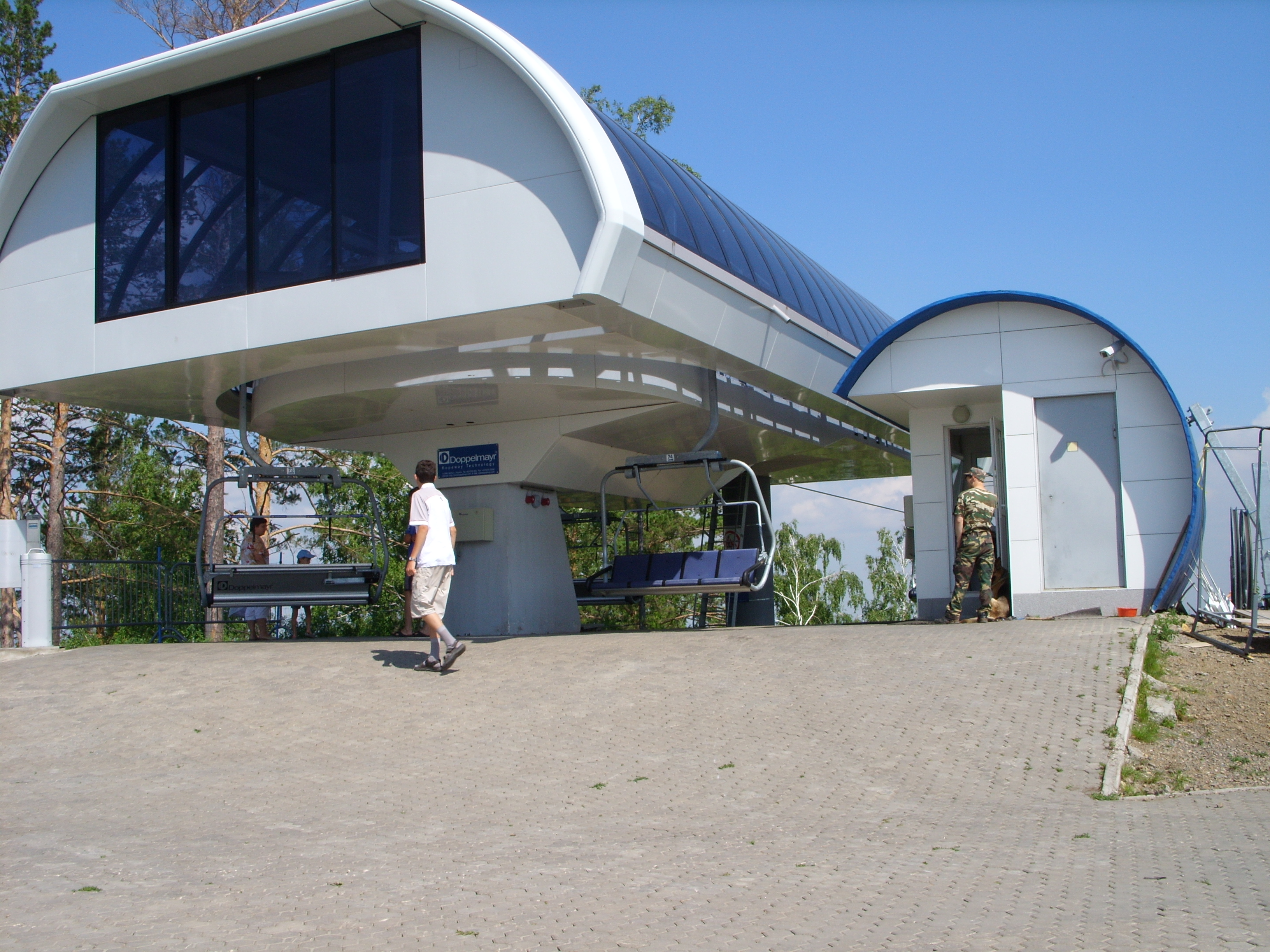 Знаменитый на всю зауральскую Россию горнолыжный комплекс и "фанпарк". Имеет известность на всю Россию, а также за рубежом. Несмотря на это, некоторые неумные представители рода админов Википедии удалили статью про него в русской Википедии, мотивировав "отсутствием энциклопедической значимости" (???)